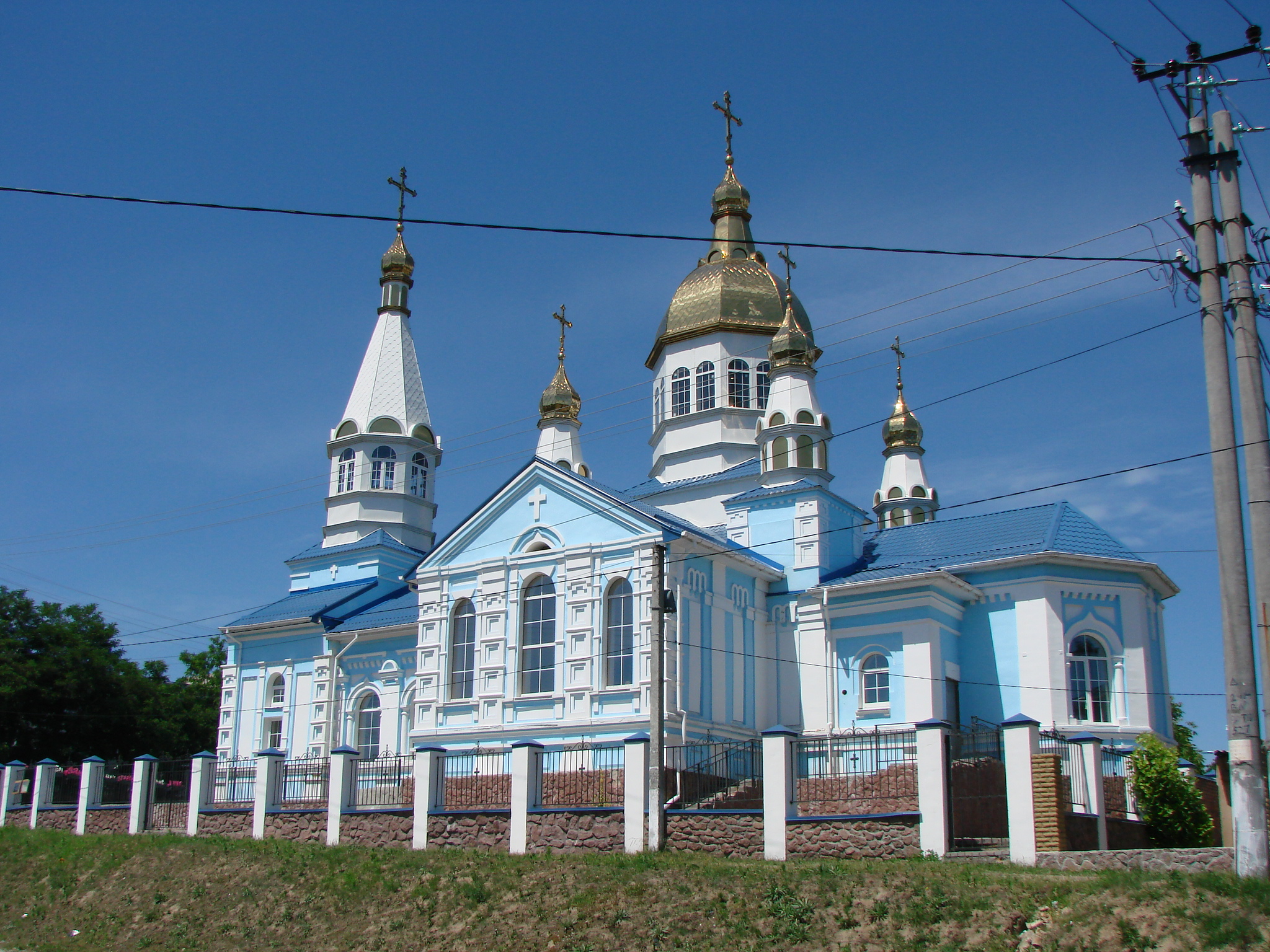 Церква Сімеона Столпника, село Петропавлівська Борщагівка